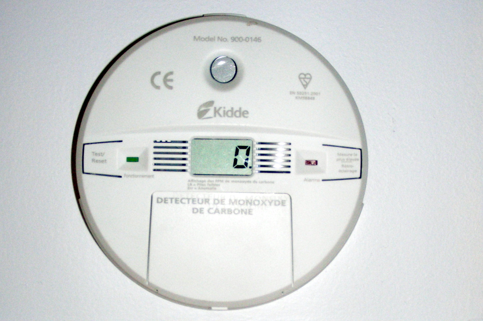 Détecteur de monoxyde de carbone en France